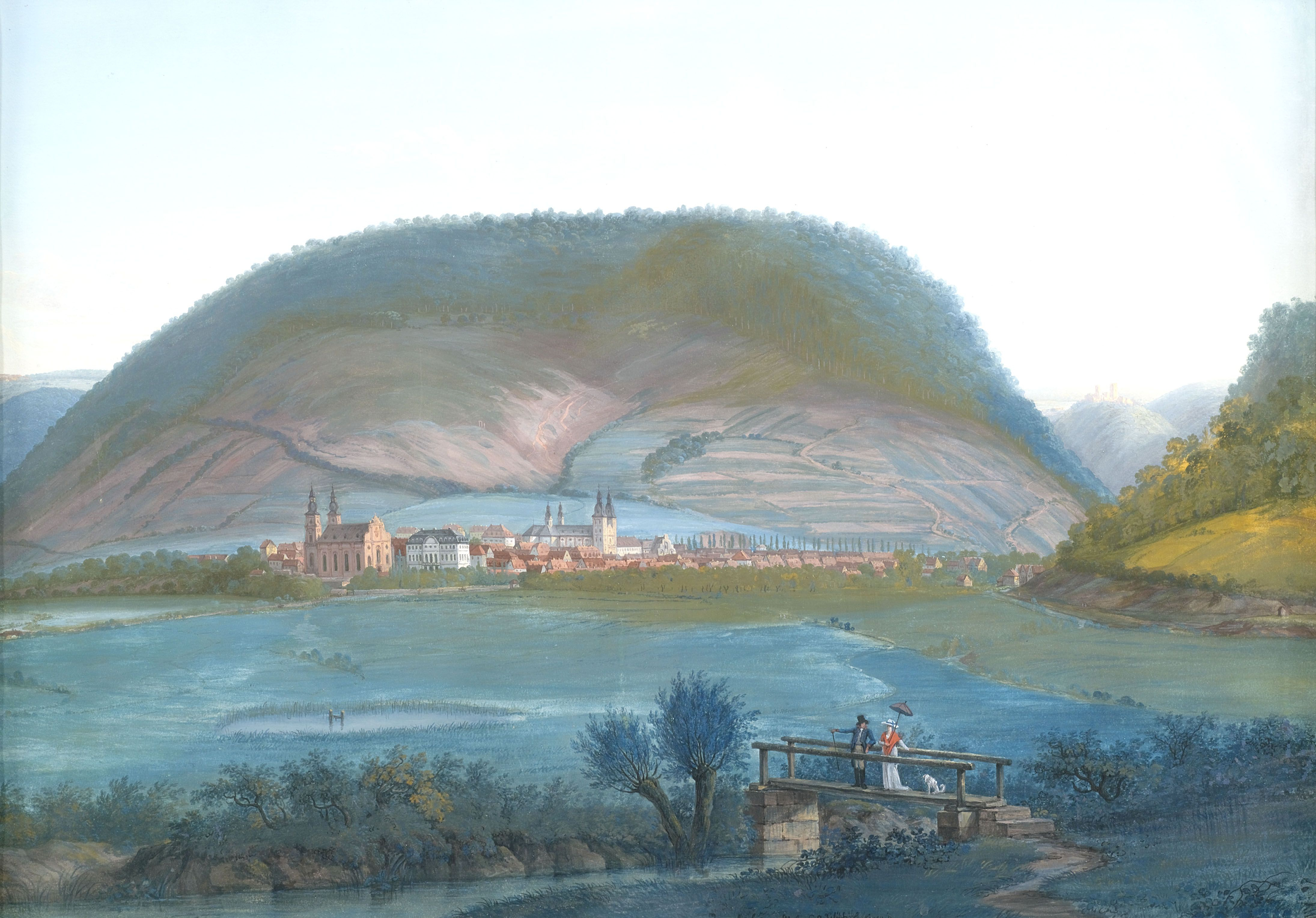 Amorbach im Odenwald, 46 x 65 cm, Gouache auf Papier, signiert